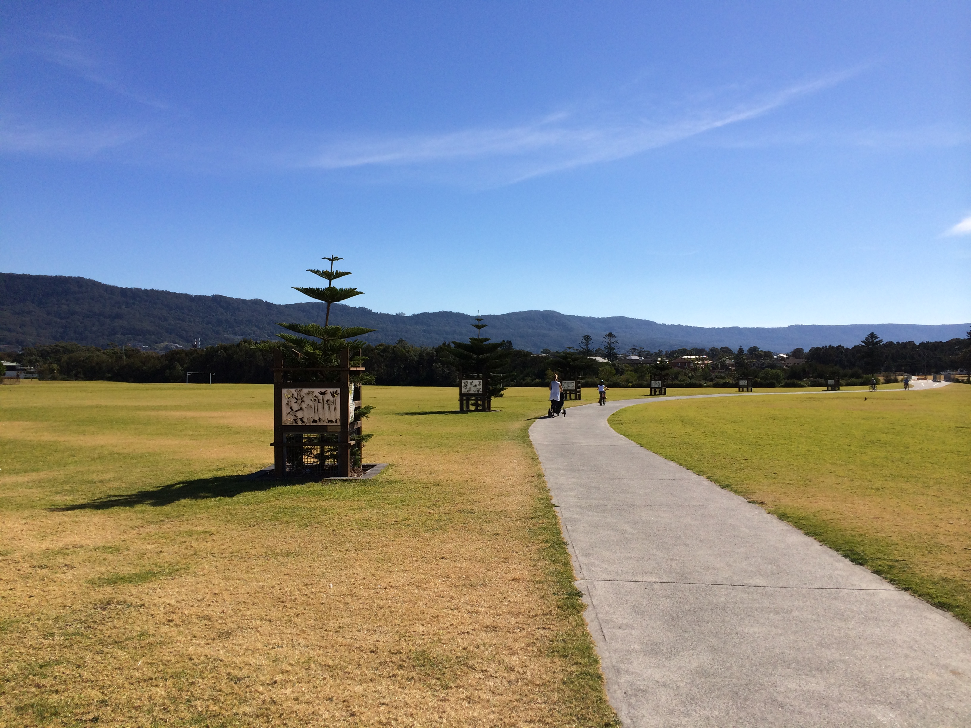 Велосипедна доріжка у Товраджі Парку, Товраджі, Новий Південний Уельс, Австралія